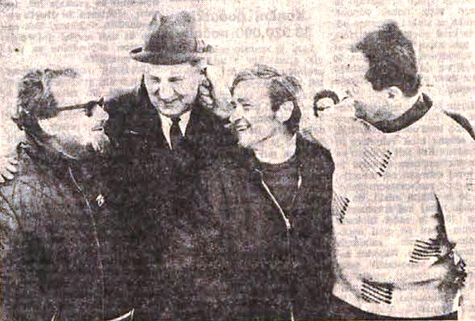 Od leve proti desni:Vlado Gorišek, Vojo Šerbec, Miro Oman in Rudi Finžgar po preiskusu planiške letalnice